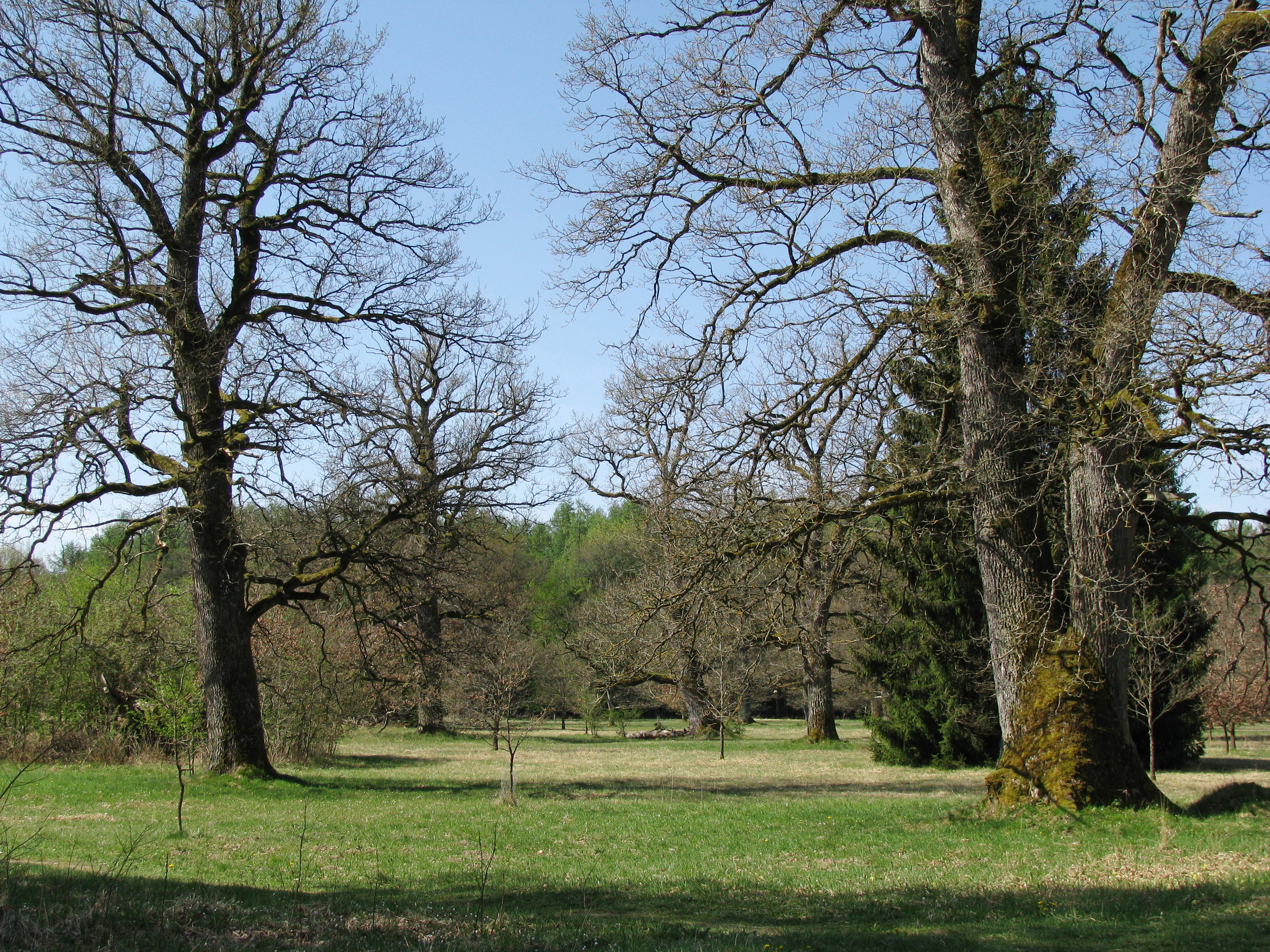 Eichelgarten im April.